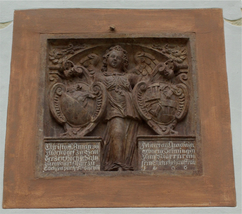 Schlossanlage, Schloss Saalhof und Wegkreuz